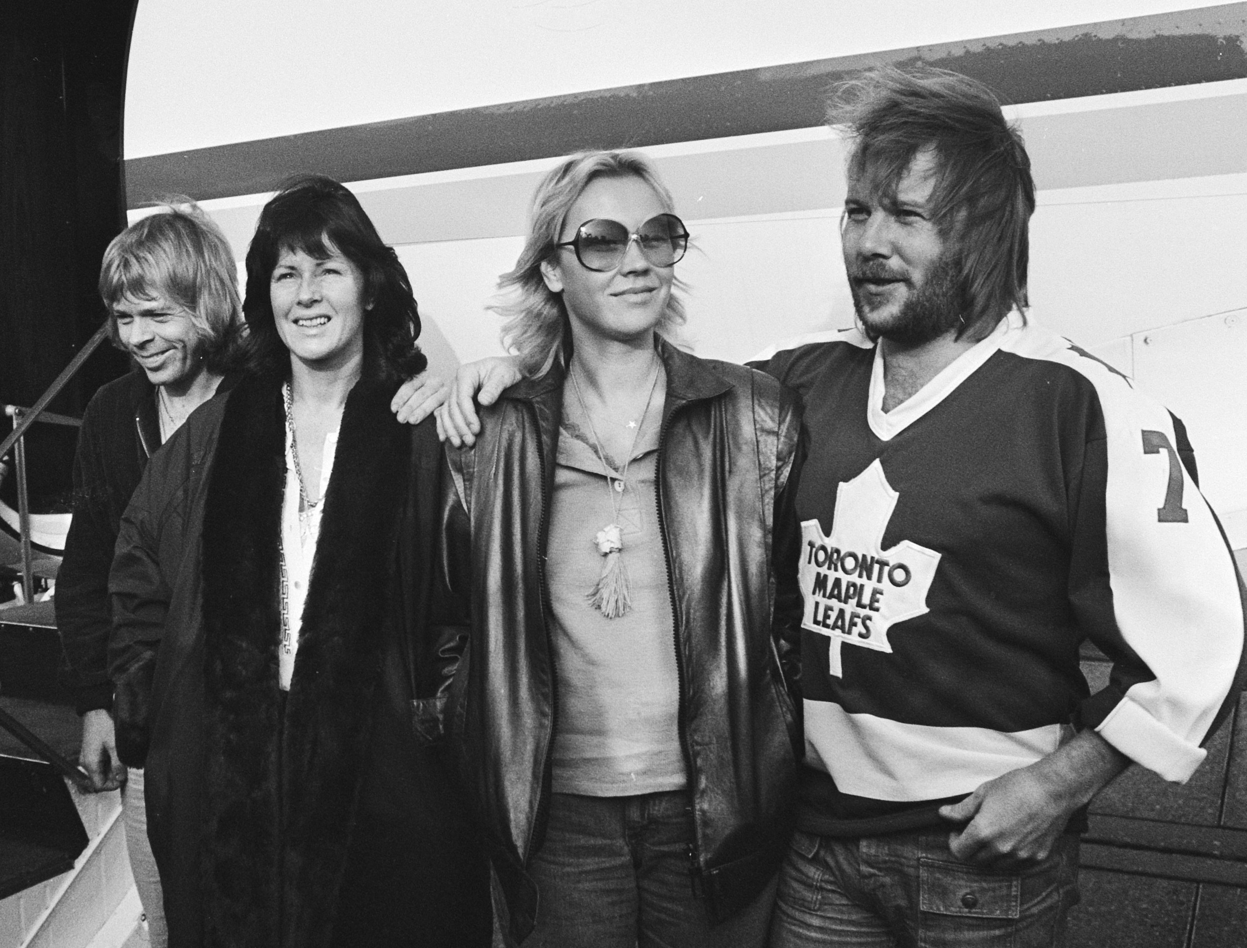 Popgroep ABBA aangekomen op vliegveld Zestienhoven Rotterdam; v.l.n.r.: Björn Ulvaeus, Anni-Frid "Frida" Lyngstad, Agnetha Fältskog en Benny Andersson